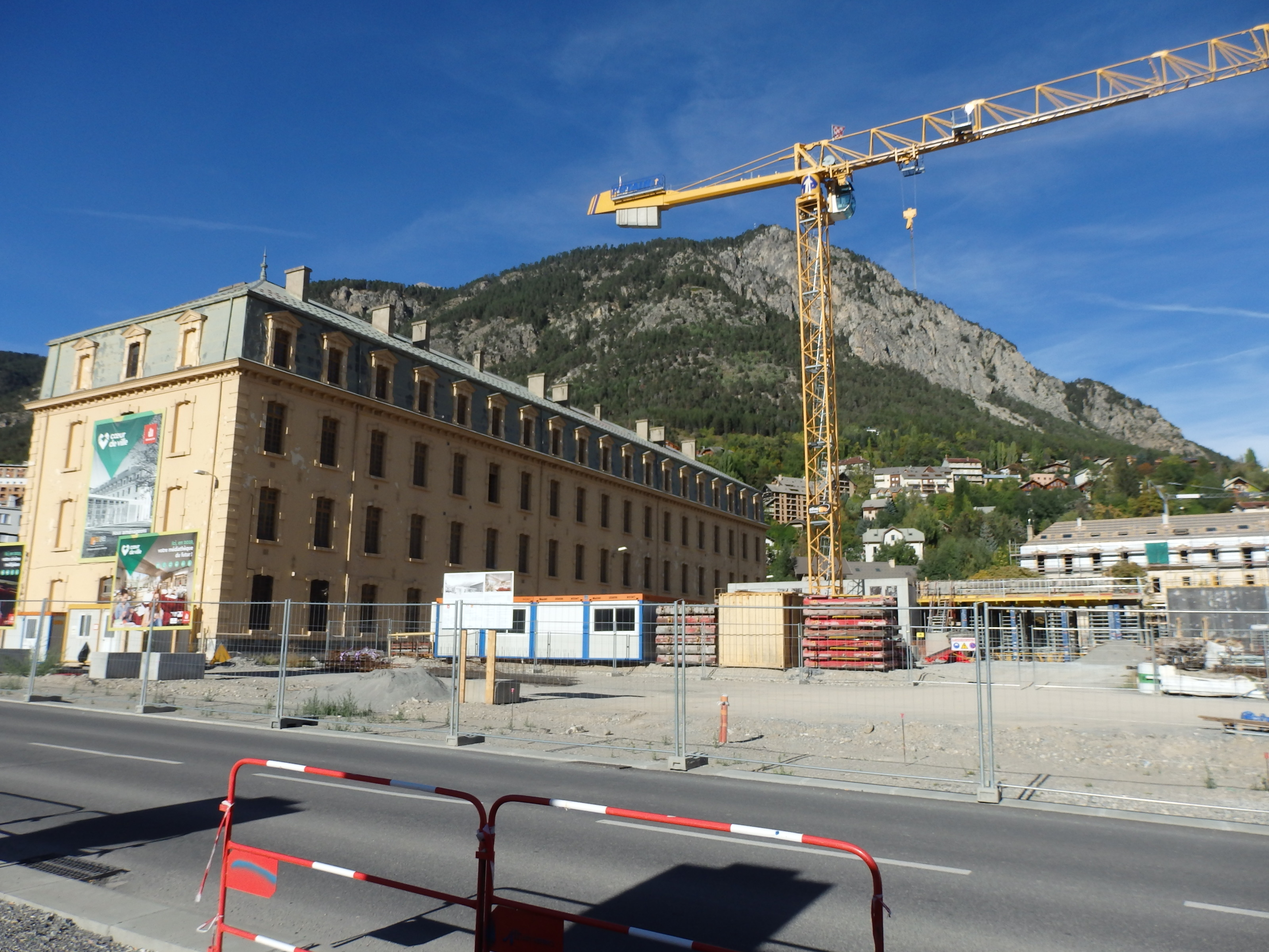 Briançon opération Coeur de Ville